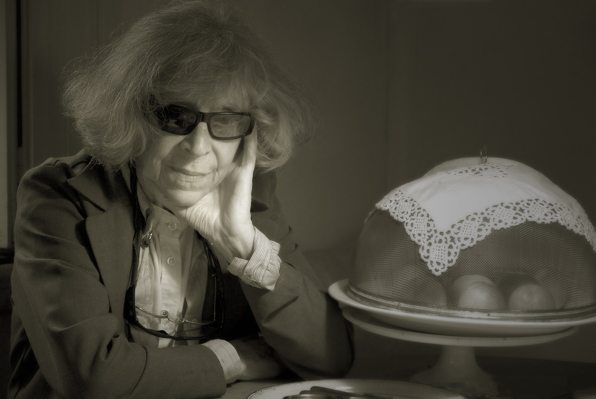 Thérèse Cornips